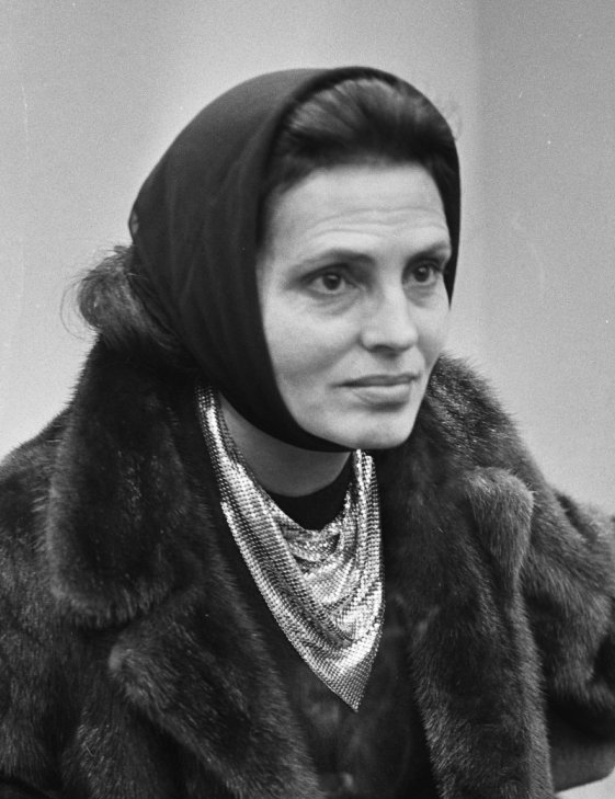 Amalia Rodrigues, cantante de fado